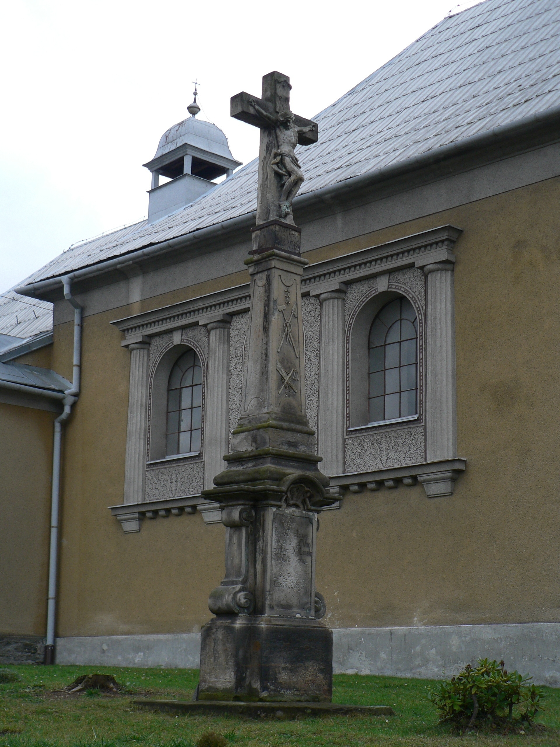 Kostel svatého Jakuba Většího (Lesnice) - kříž u kostela